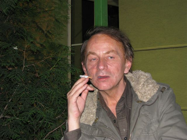 Michel Houellebecq (b. 1958), French writer